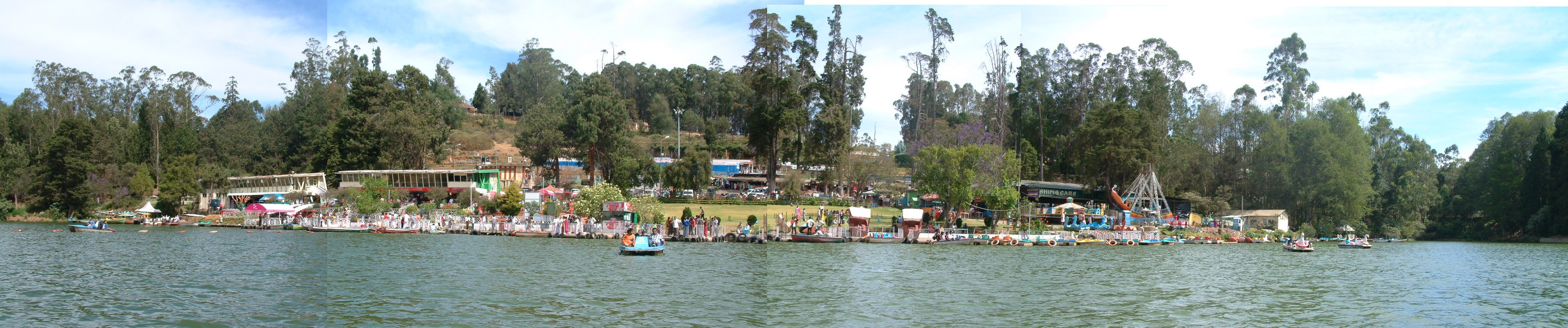 ഊട്ടി ബോട്ട് ഹുസ്- വെള്ളത്തിൻ നിന്ന് എടുത്ത നാലു പടങ്ങൾ സം‌യോജിപ്പിച്ച് നിർമ്മിച്ച പാനോറാമിക് വ്യൂ.